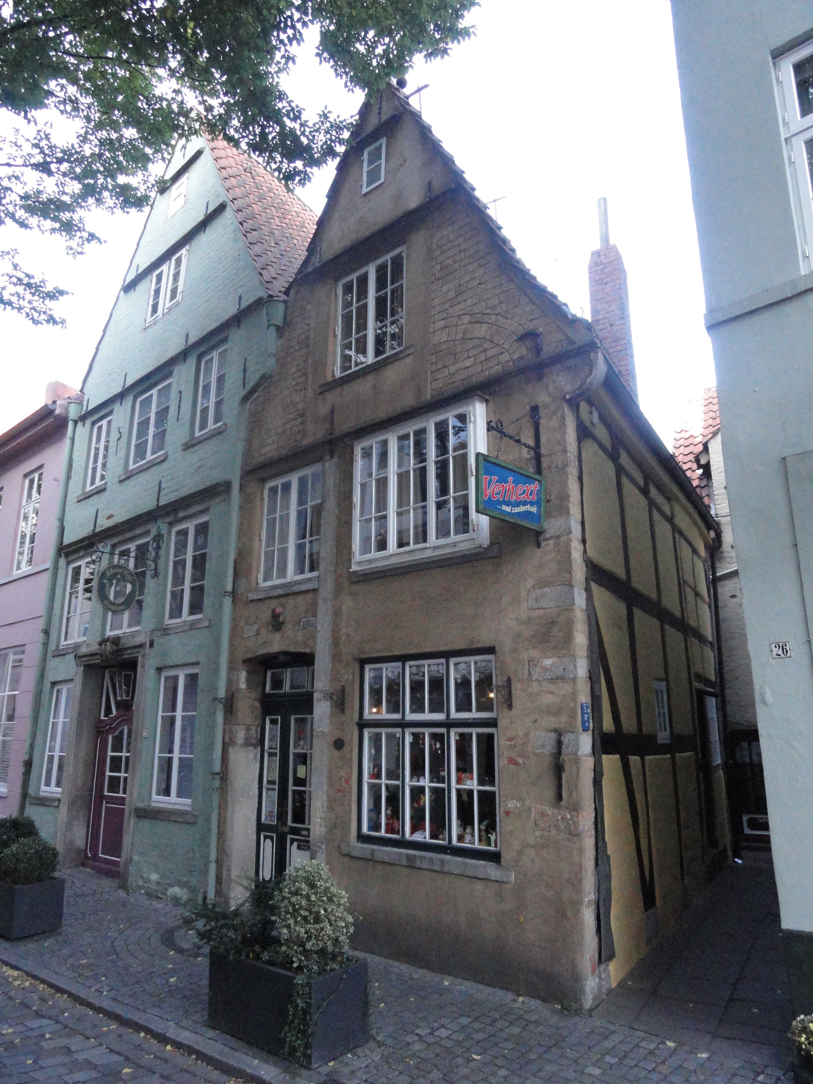 Bremen, Marterburg 28 (links) und 27 (rechts)